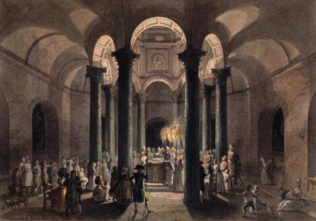 Vue intérieure du Baptistère [de] léglise de S. Sauveur d'Aix-en-Provence : [dessin] / meunier f. a aix 1792